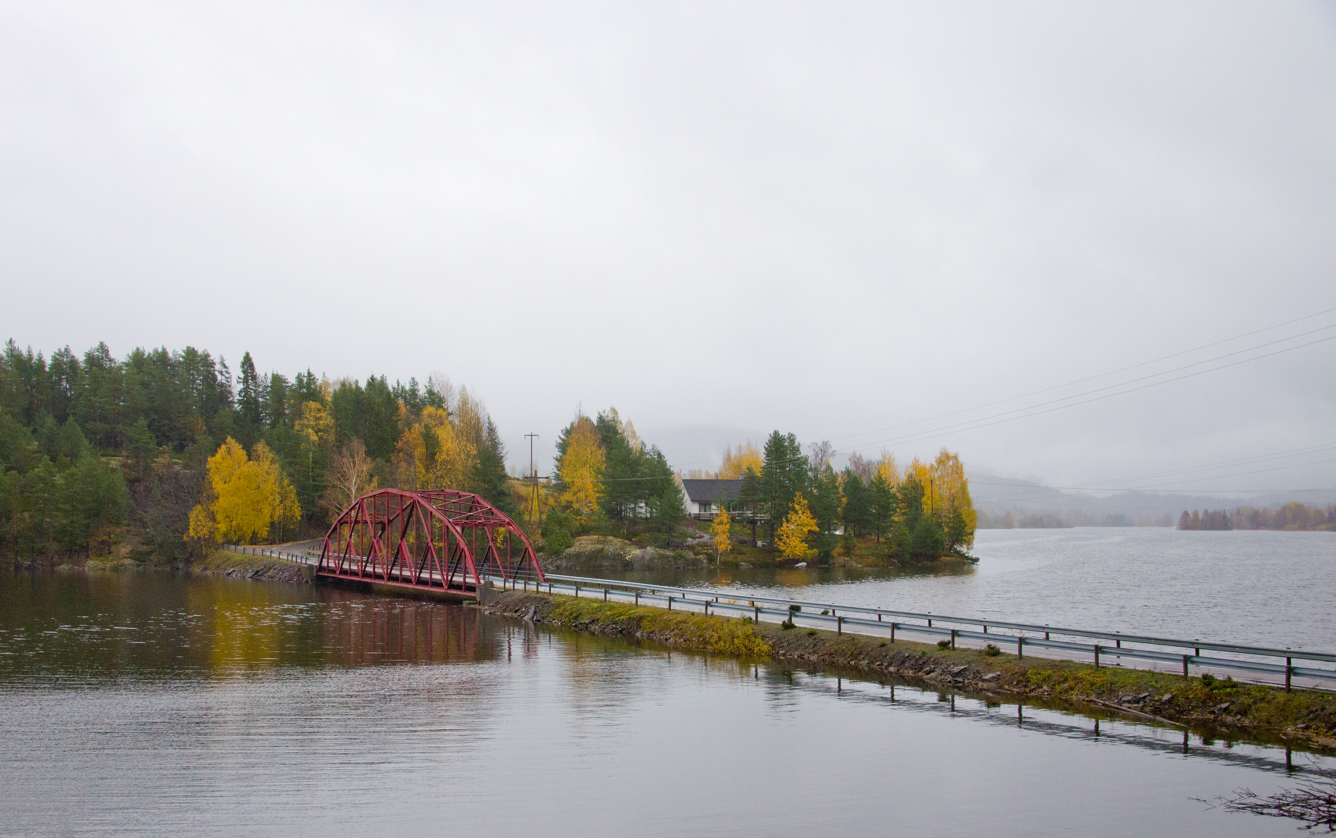 Vestfolds fylkesvei 881 Røedsveien, Rød bru, Bergsvannet